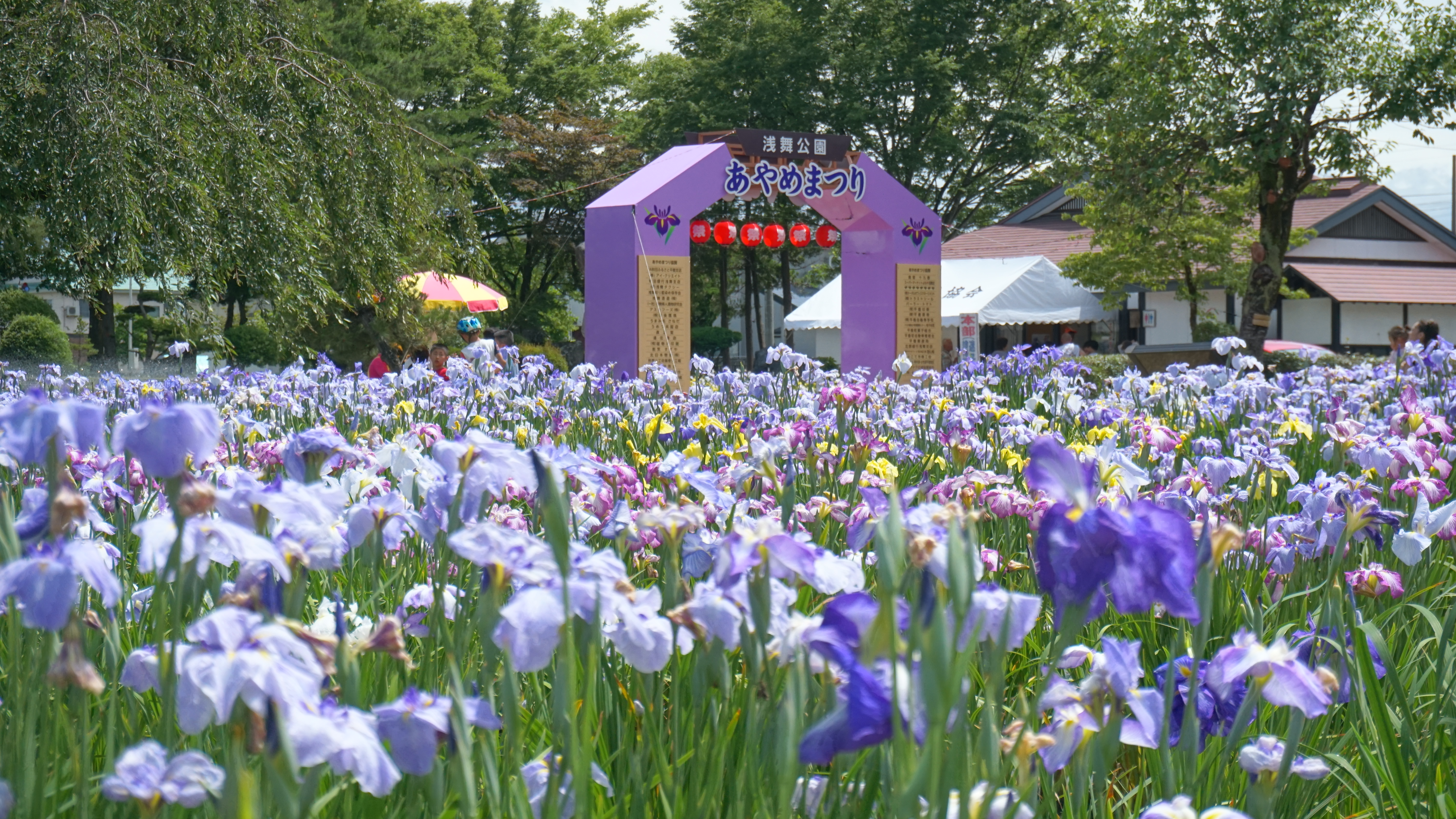 浅舞公園あやめまつりにて（秋田県横手市）